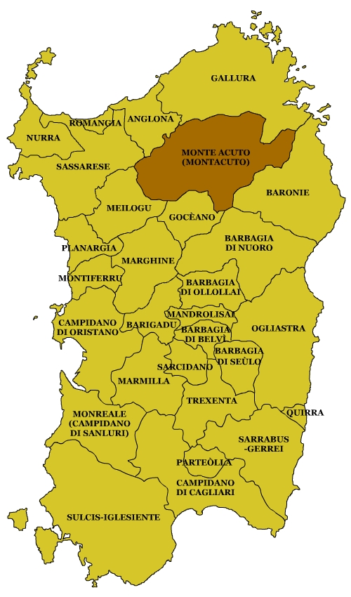 Sardinian Subregions